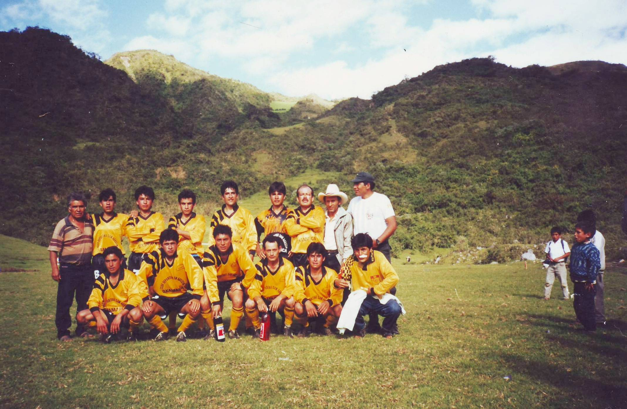 deportes